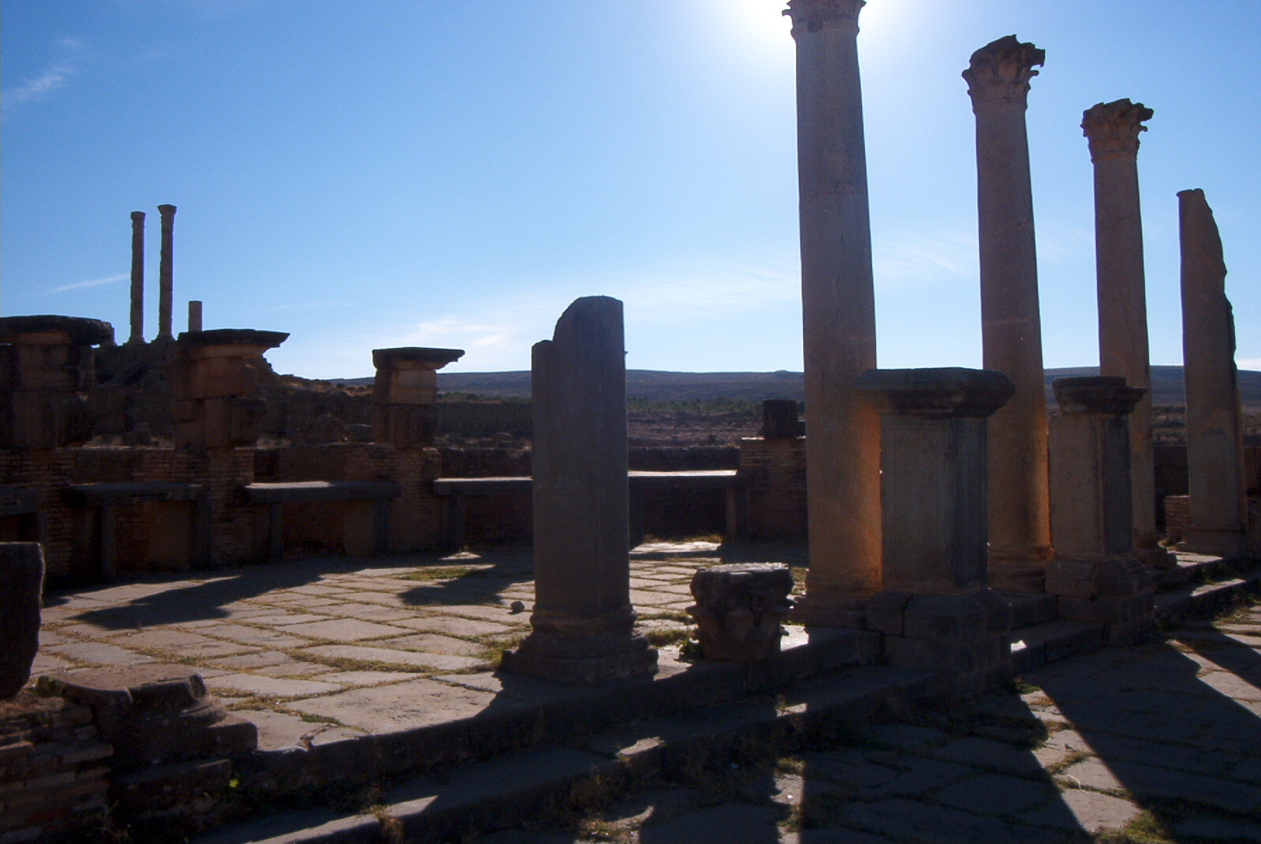 Marché de Sertius à Timgad (Algerie)